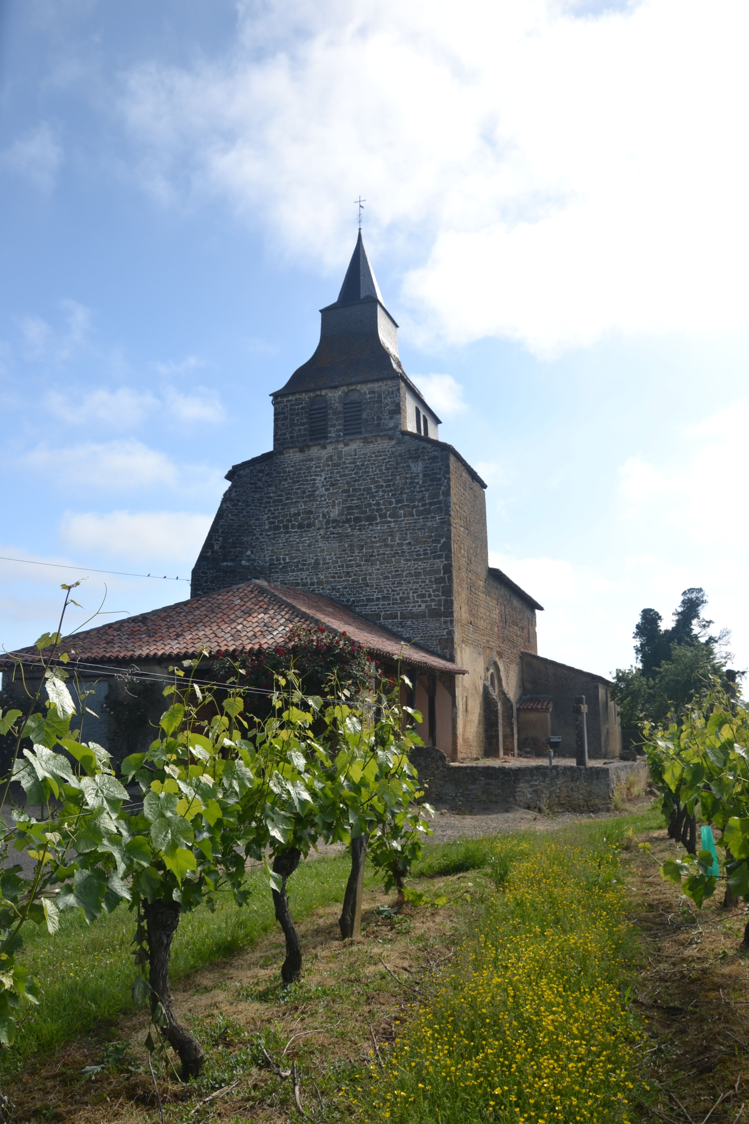 Église de Pouydraguin